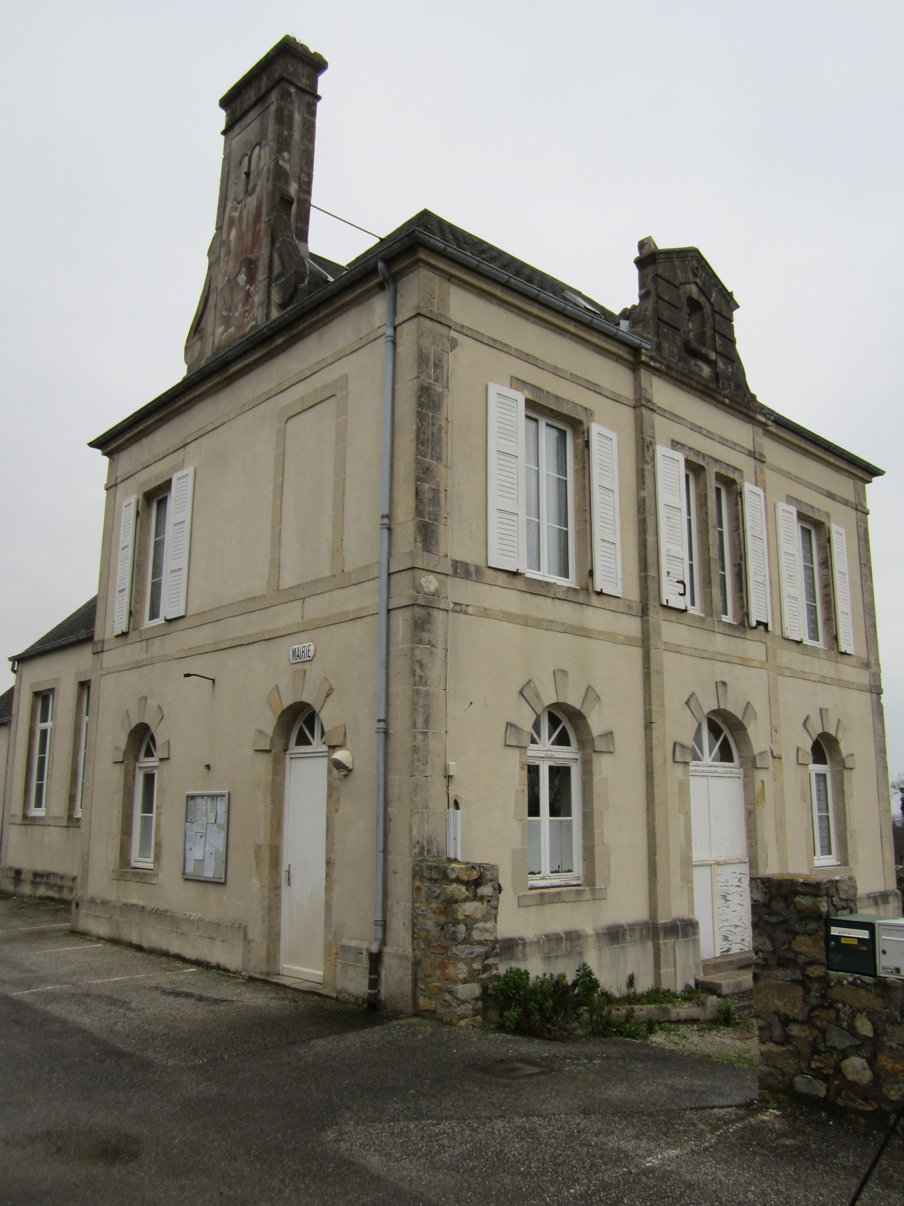 Morsalines